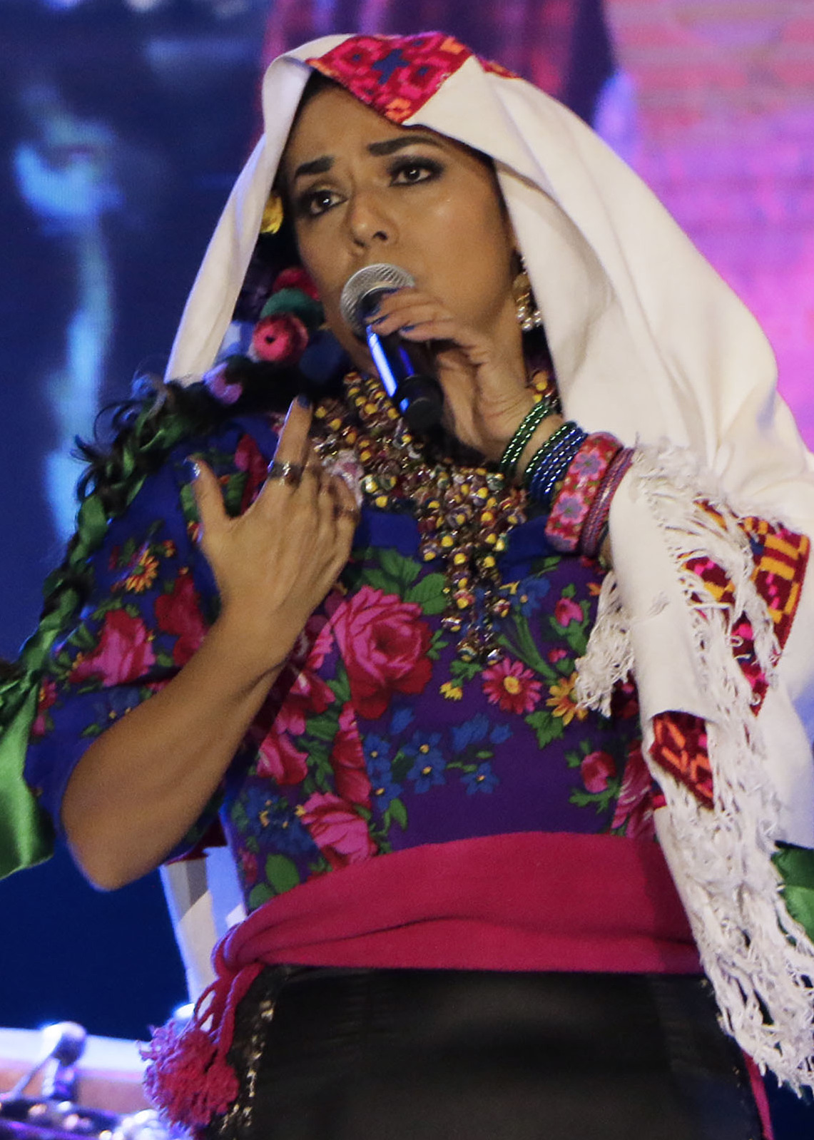 Sábado 15 de noviembre de 2018 En el Zócalo de la Ciudad de México, se realizó el concierto titulado Voces de Mujeres, en el que participó la agrupación Caña Dulce y Caña Brava; así como la cantante María Daniela y su Sonido Lasser; Ely Guerra; Lila Downs y Cecilia Toussaint, quien fue declarada como Patrimonio Cultural Vivo, por su contribución al rock nacional, con una trayectoria de más de 40 años. Fotografía: Tania Victoria/ Secretaría de Cultura Ciudad de México